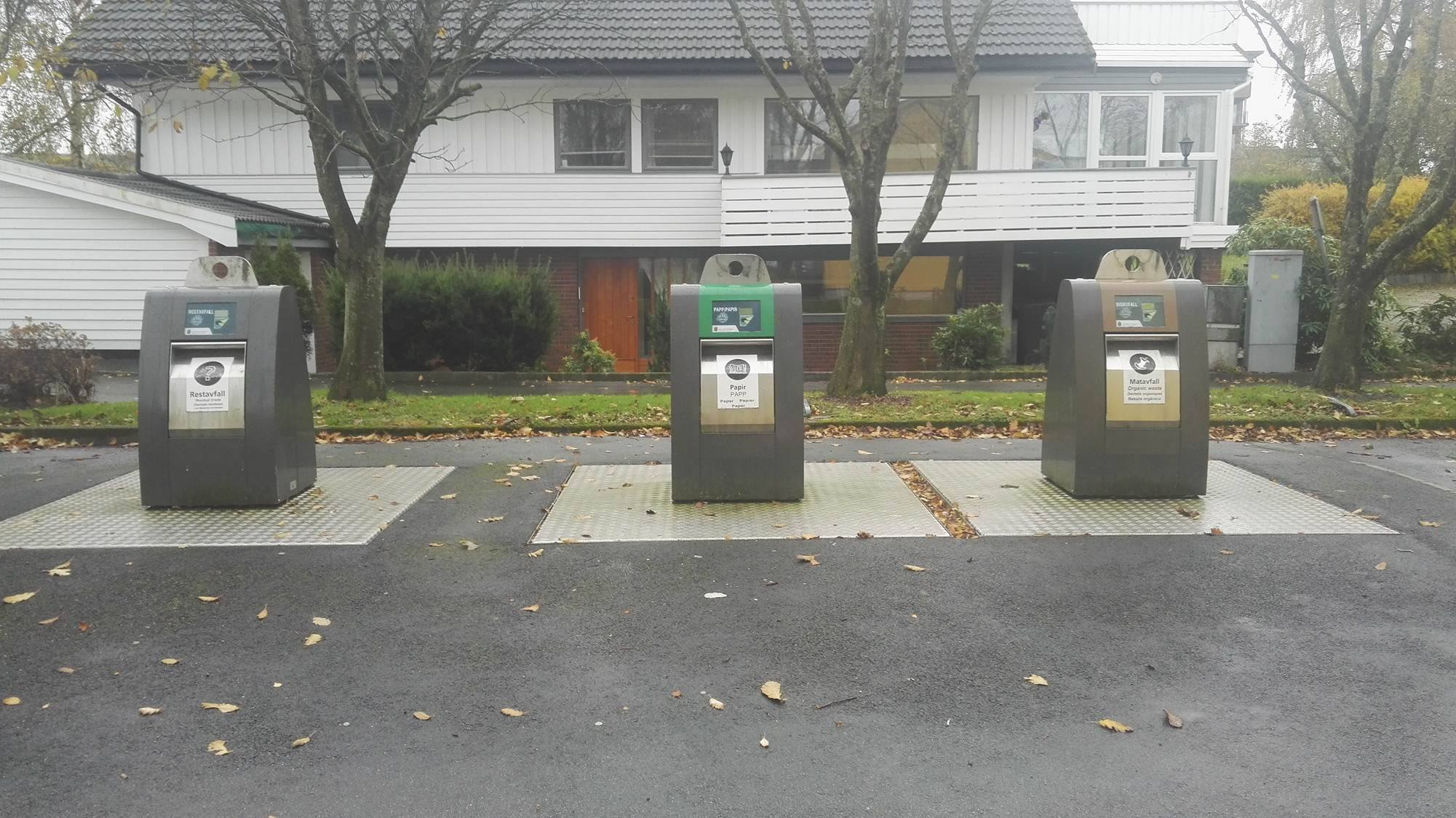 Moderne bossnett som er å finne i Bergen sentrum